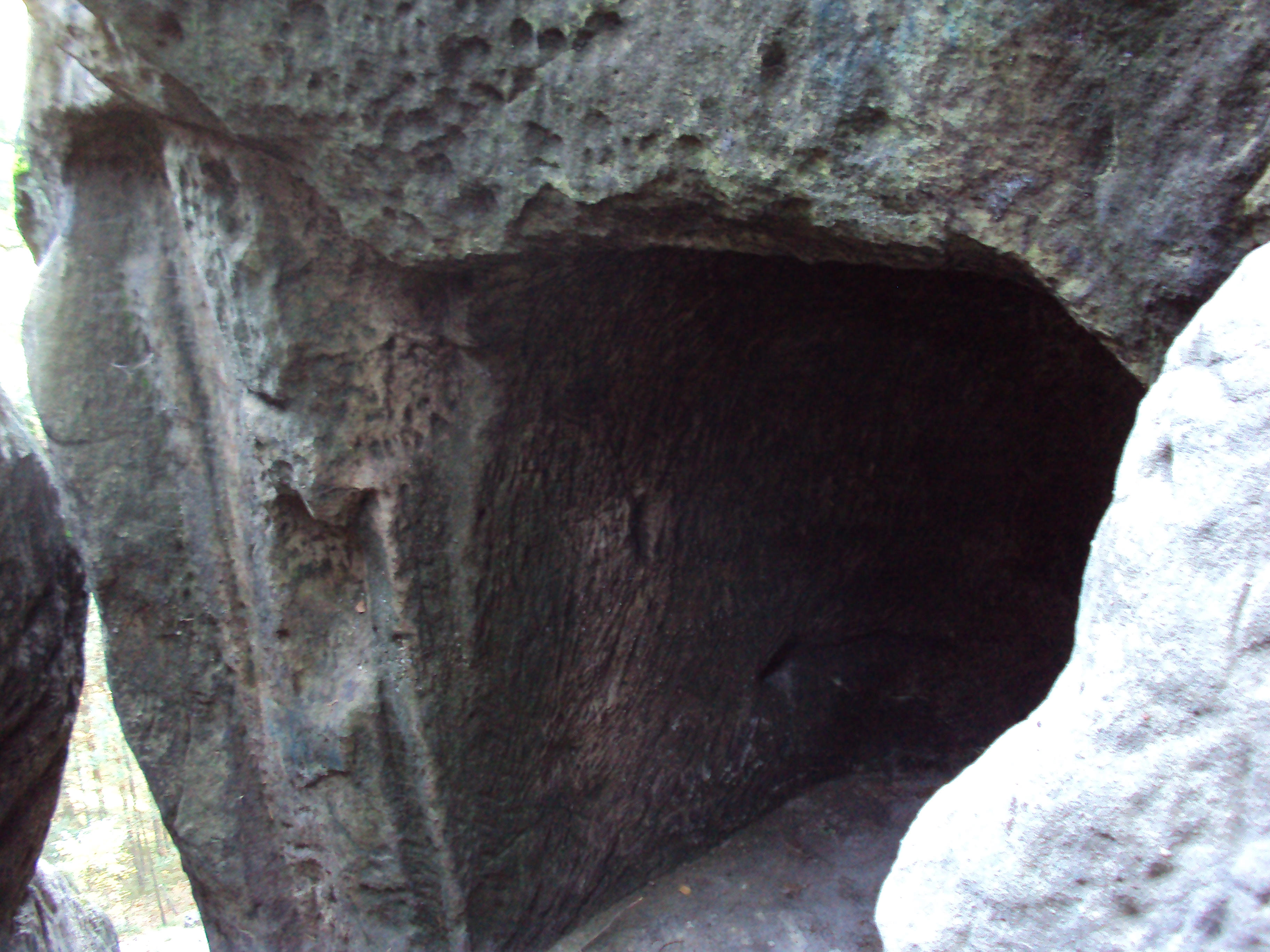 Přírodní památka Stohánek, jedna z místností ve skále, asi 4 km na jih od Hamr na Jezeře